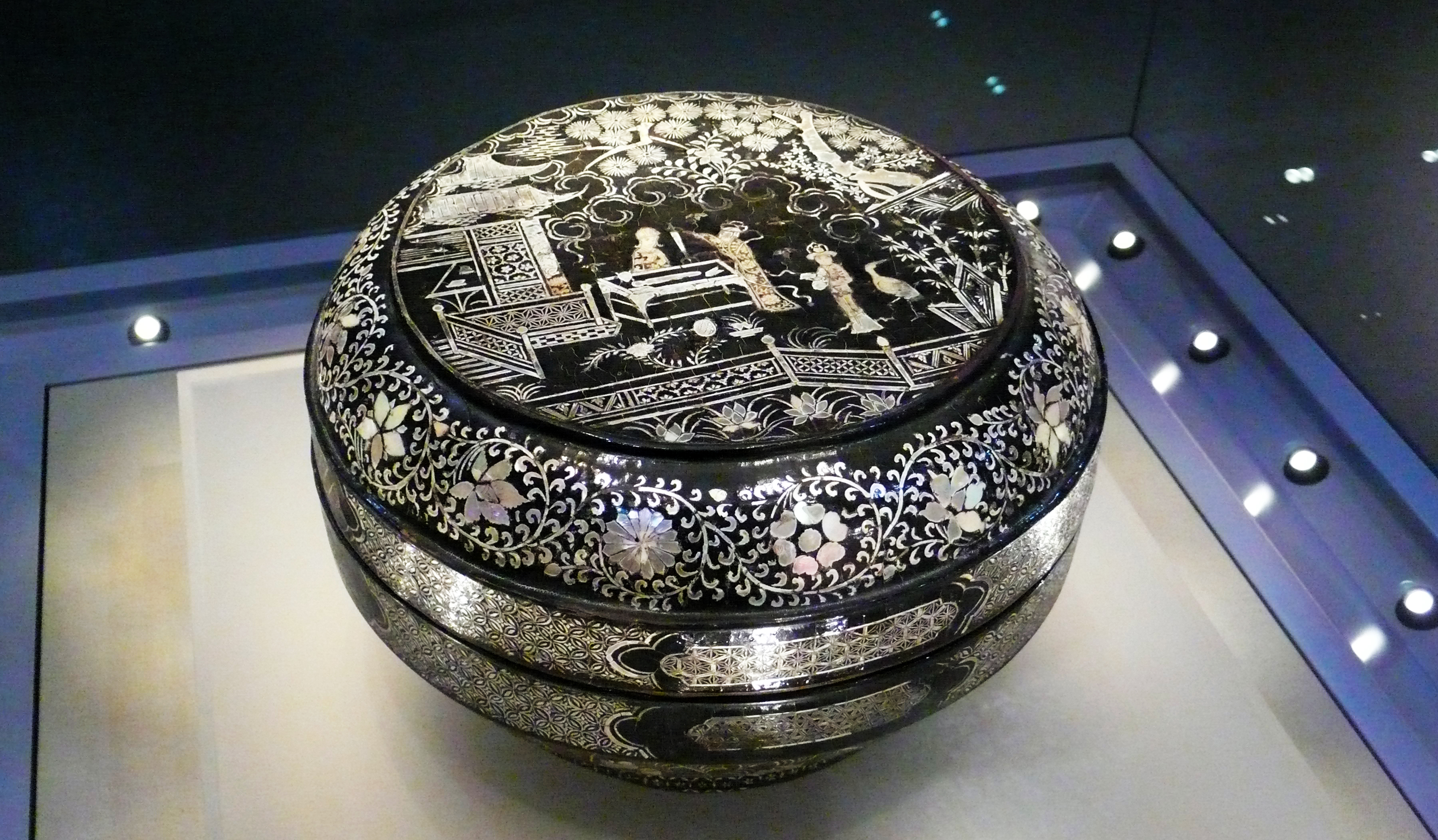 黑漆嵌螺钿人物图盒。宋-元早期。浙江省博物馆藏。